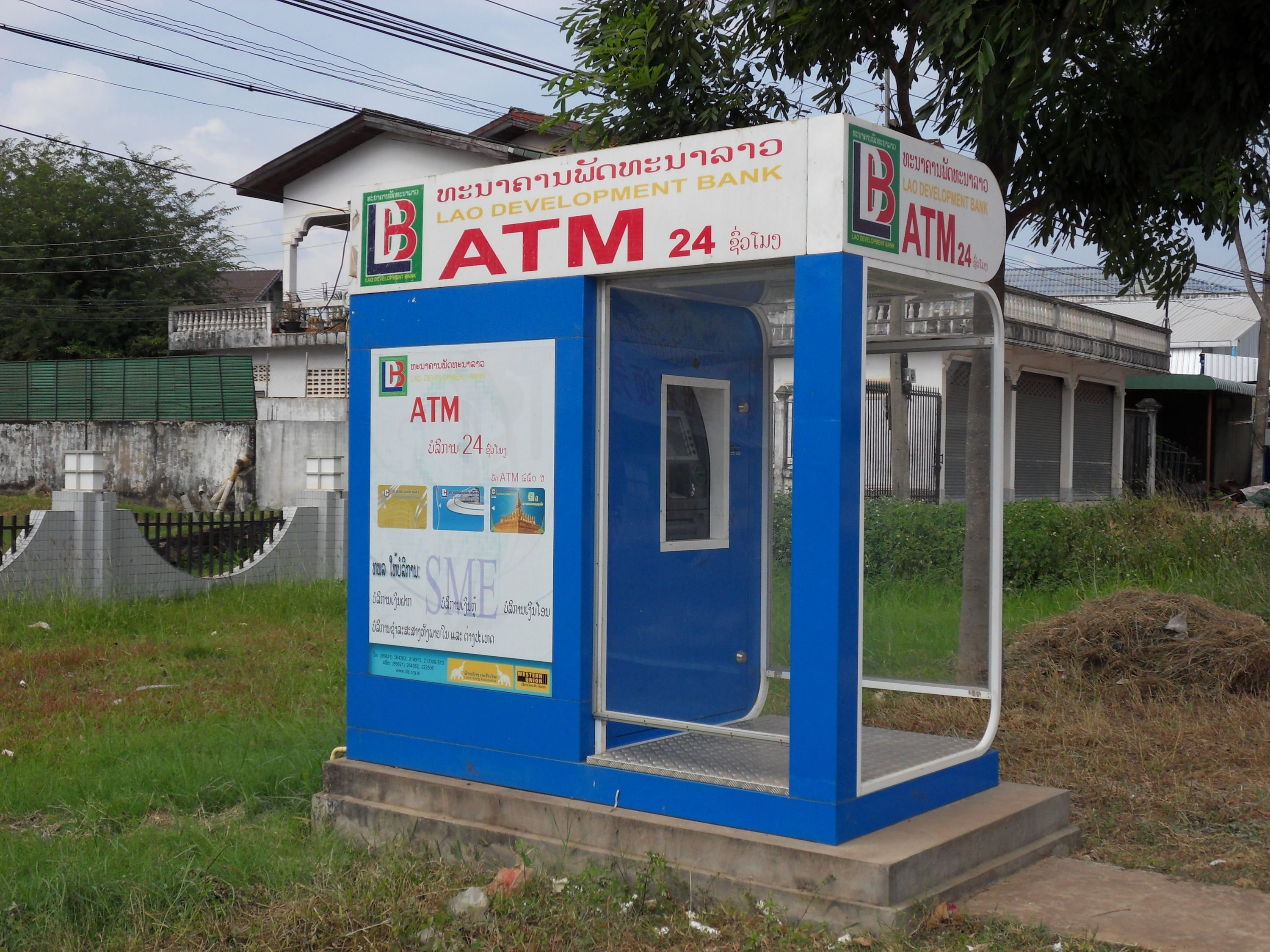 Un distributeur automatique à Savannakhet (Laos) en novembre 2011.